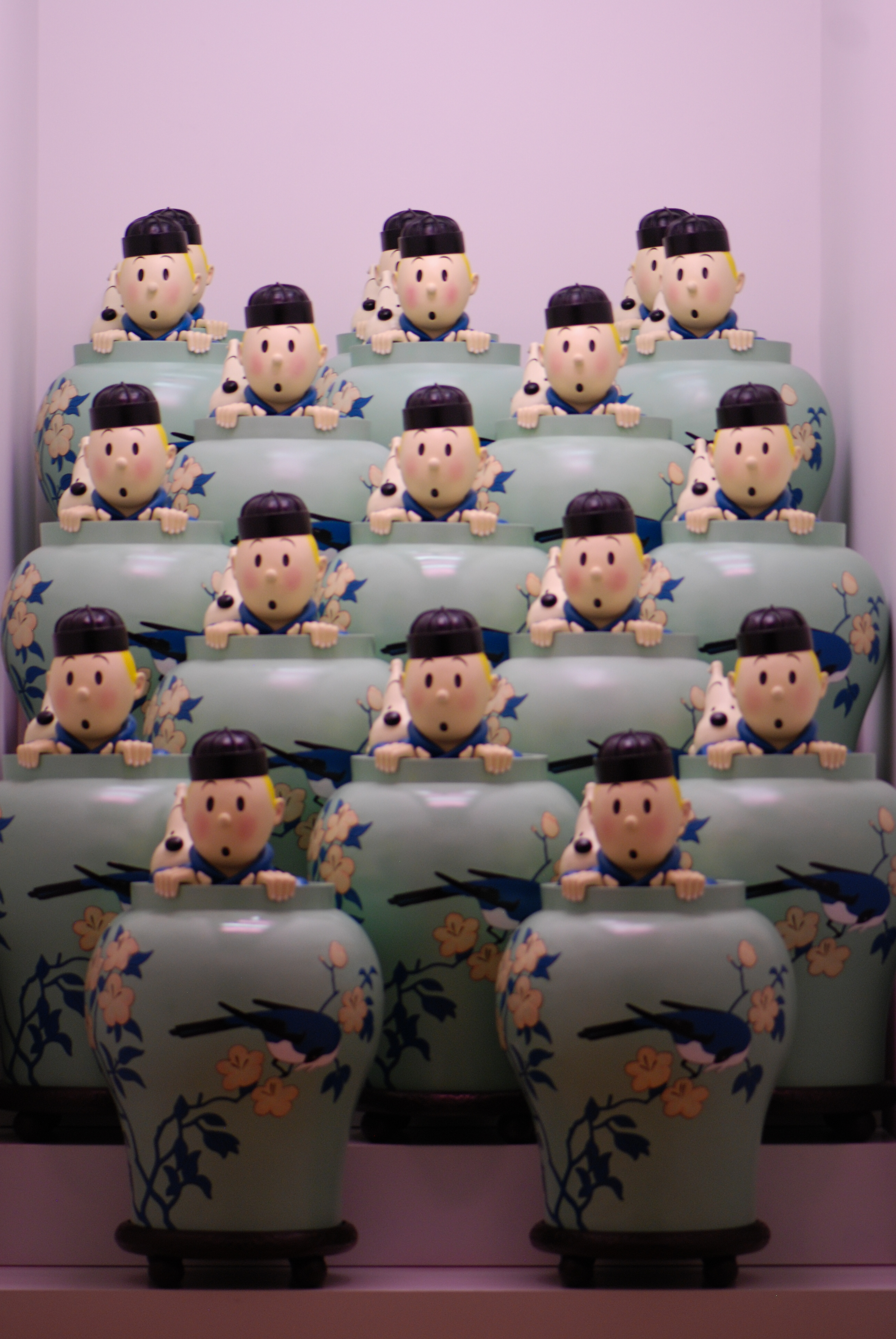 Belgium